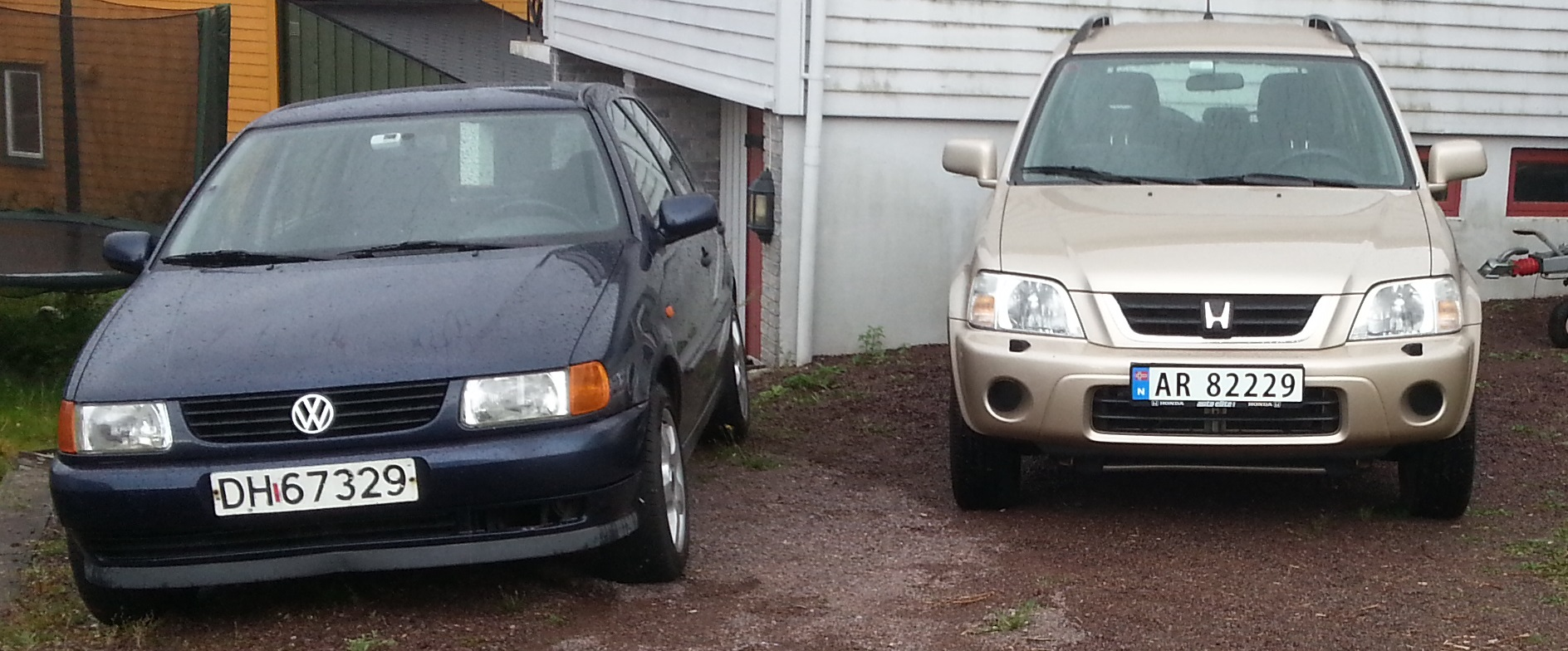 Bilde av to biler, med gammelt og nytt kjennemerke. Skiltet til høyre er fra etter 1. november 2006, med såkalt nasjonalitetsstripe til venstre. Bilen til venstre har gammelt skilt uten nasjonalitetsstripe.